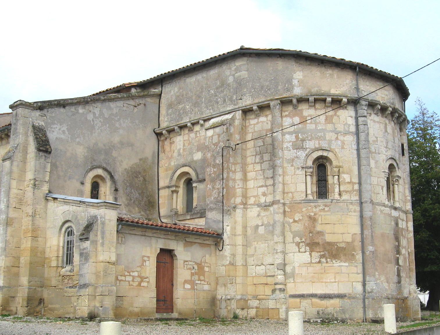 Abside 12e s.Vue du sud. CMH 1925. .